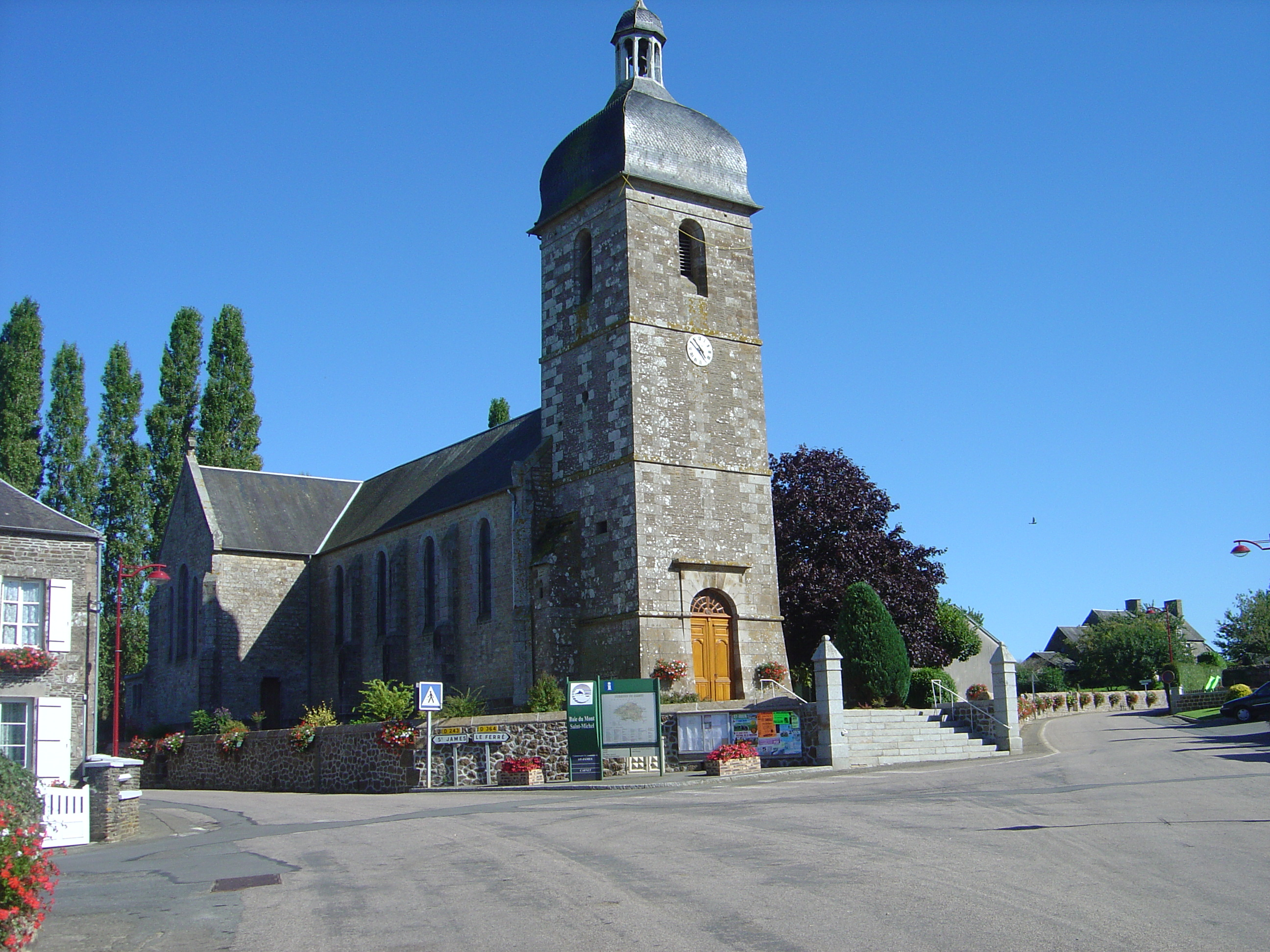 Église de Carnet, sur la place centrale dans le bourg de Carnet (département de la Manche, France).